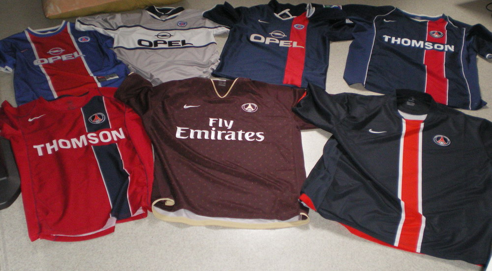 maillots psg.jpg